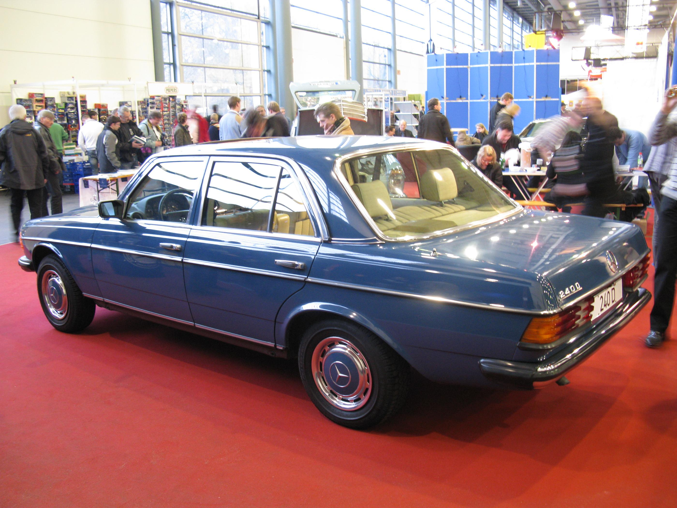 Mercedes-Benz 240 D